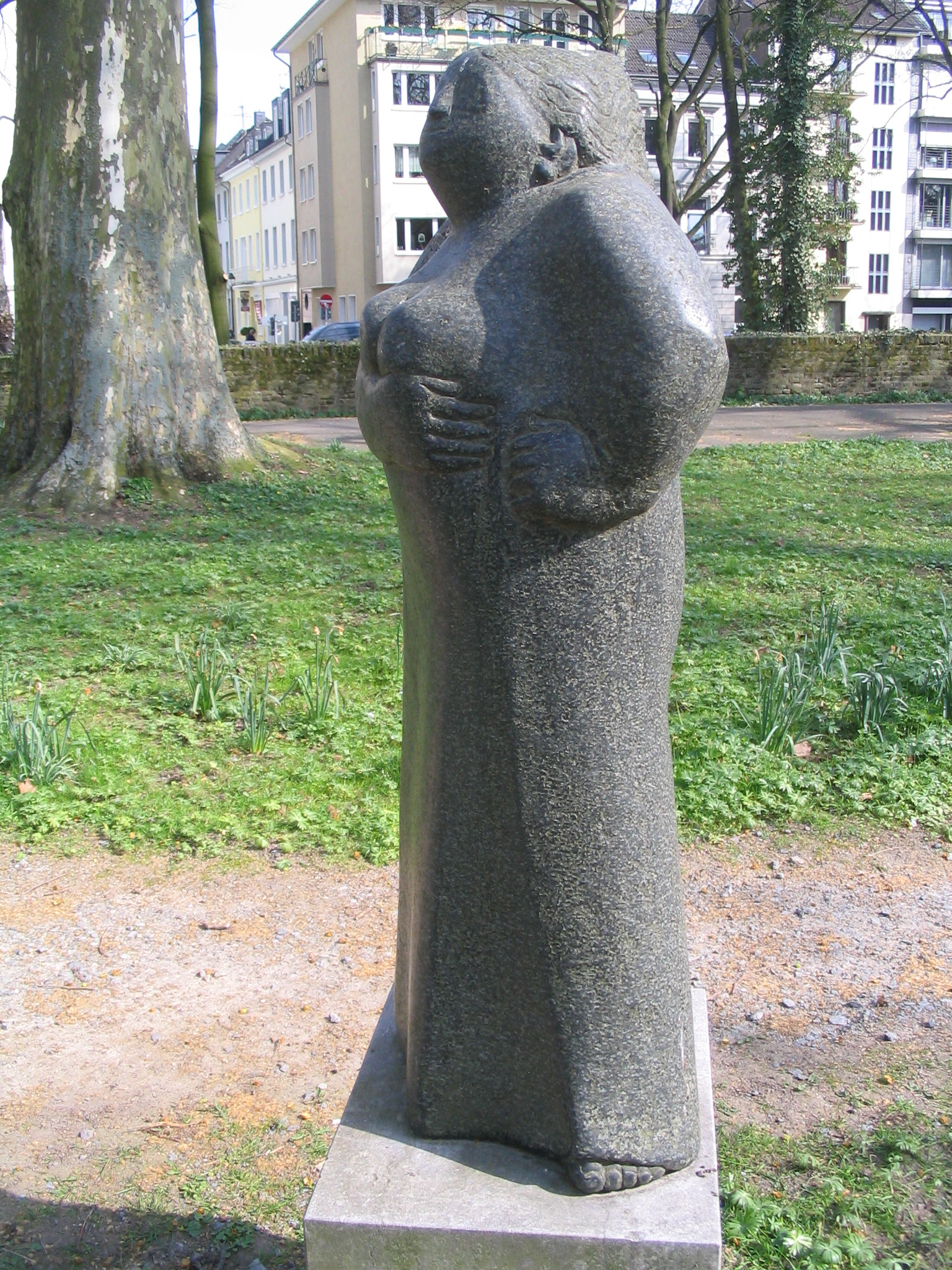 Düsseldorf, Spee'scher Park. Kunsthändlerin „Mutter Ey“. Skulptur von Hannelore Köhler